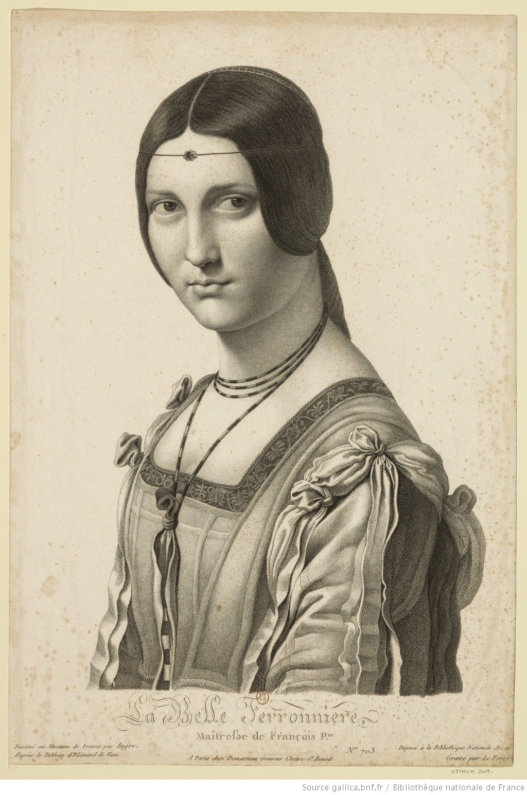 La Belle Ferronniere, Maitreβe [sic] de François P.er : [estampe] / Dessiné au Museum de France par Ingres ; d'après le Tableau d' Eléonard de Vinci ; Gravé par Le Fevre